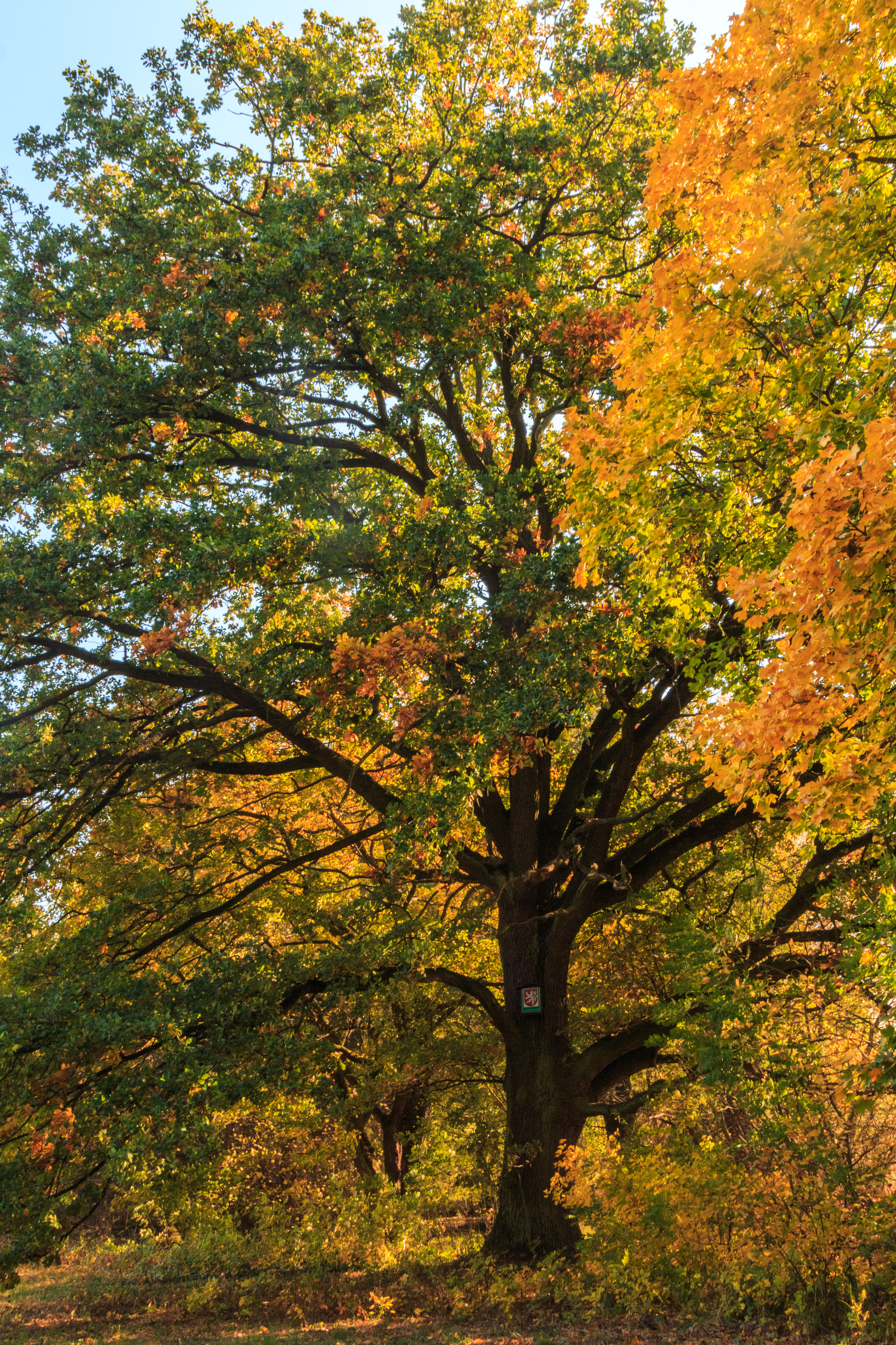 Památný dub u slepého ramene u Malšovic Project: Vodstvo.